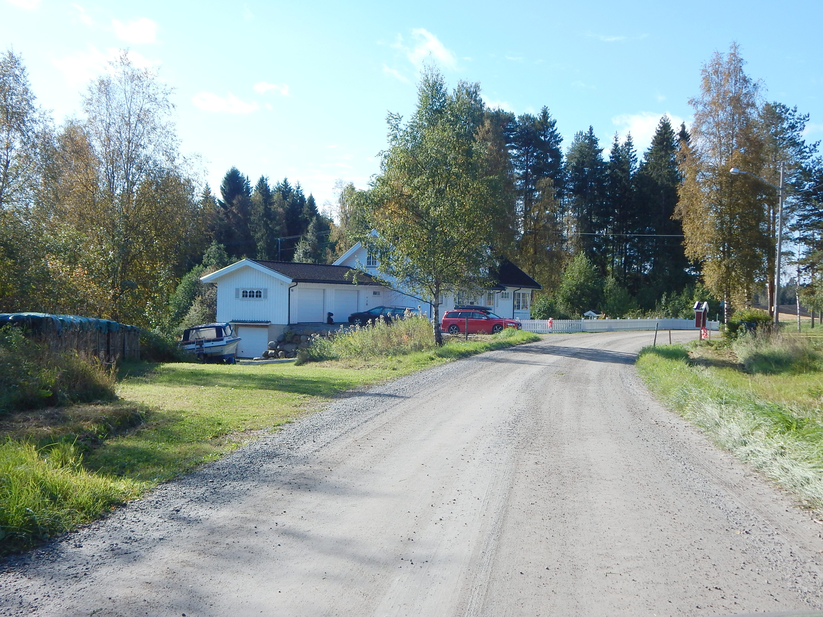 Vestbygdvegen (fylkesvei 1826, tidl. 152) i Løten